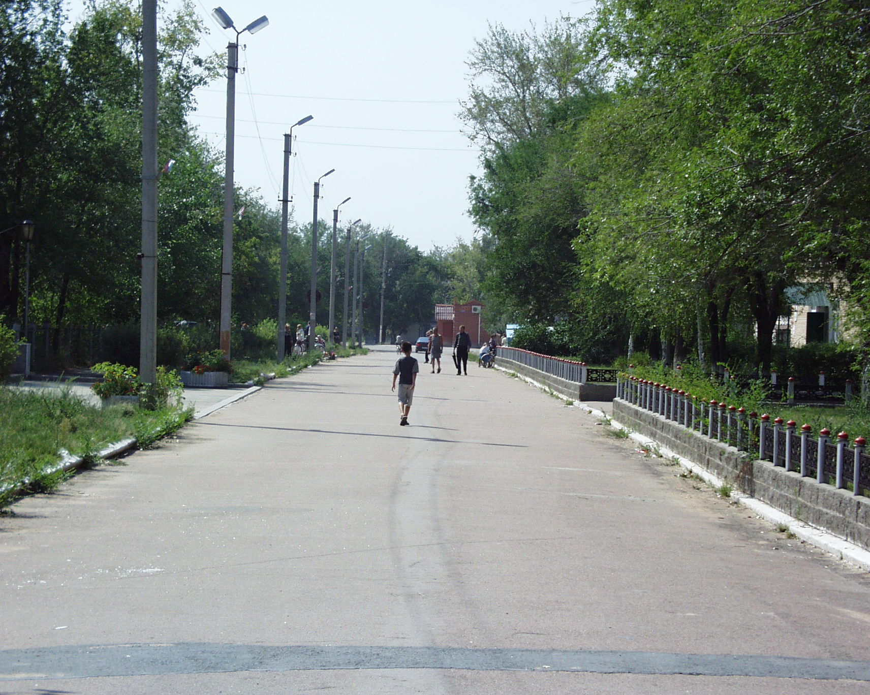 ул Комарова